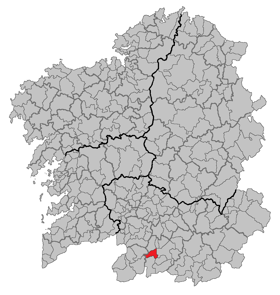 Mapa coa localización do concello de Porqueira.